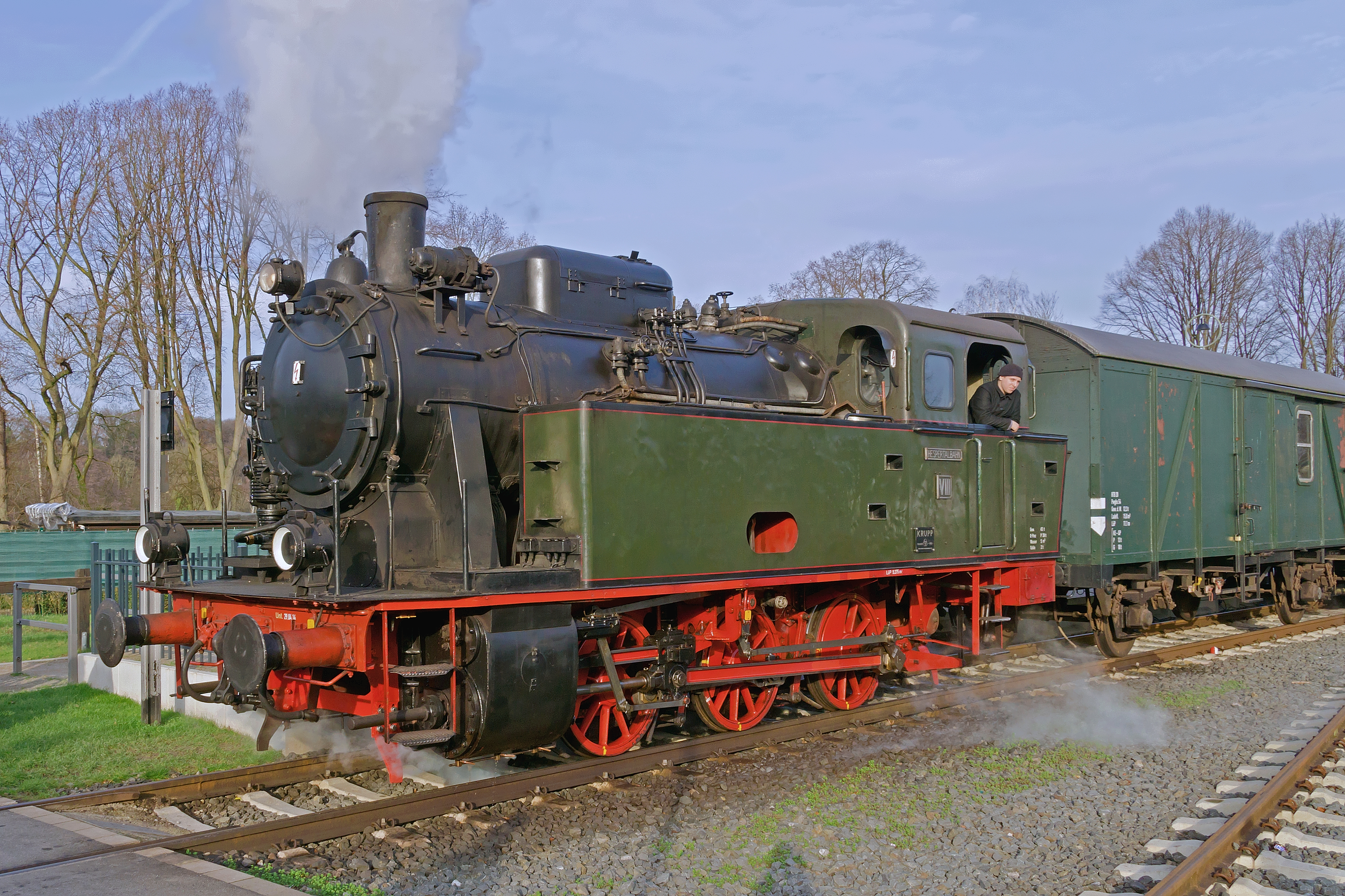 Dampflokomotive Nr.8 (Typ Krupp "Knapsack") der Hespertalbahn e.V. in Essen-Kupferdreh, 27. Dezember 2015